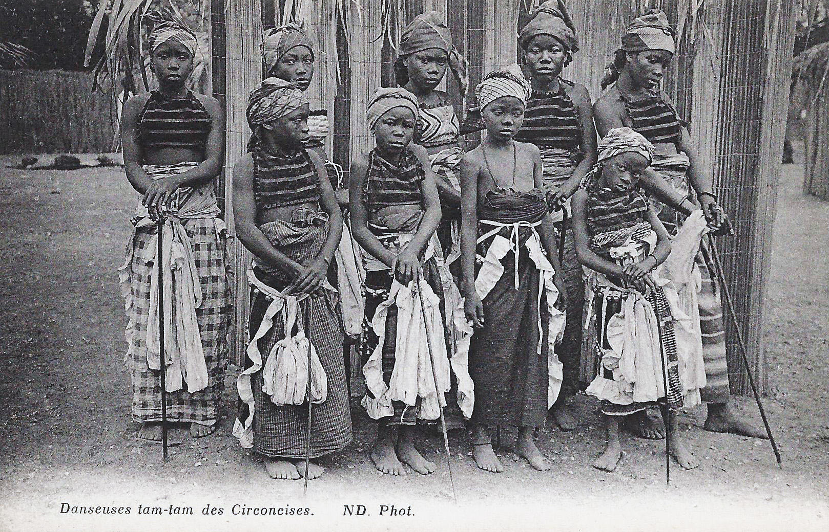 Danseuses tam-tam des circoncises. [Afrique Occidentale, Sénégal ? Guinée ?]